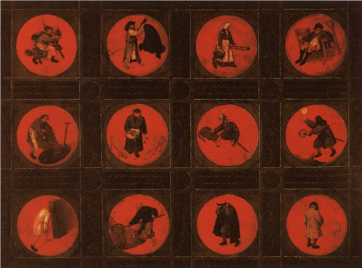 Darstellungen niederländischer Sprichwörter des 16. Jahrhunderts.